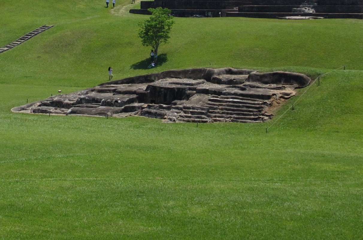 Templo III-A en la zona arqueológica de Comalcalco, estado de Tabasco, México. En este templo se aprecian las primeras etapas constructivas de esta ciudad. Los mayas construyeron montículos de tierra recubiertos con estuco.